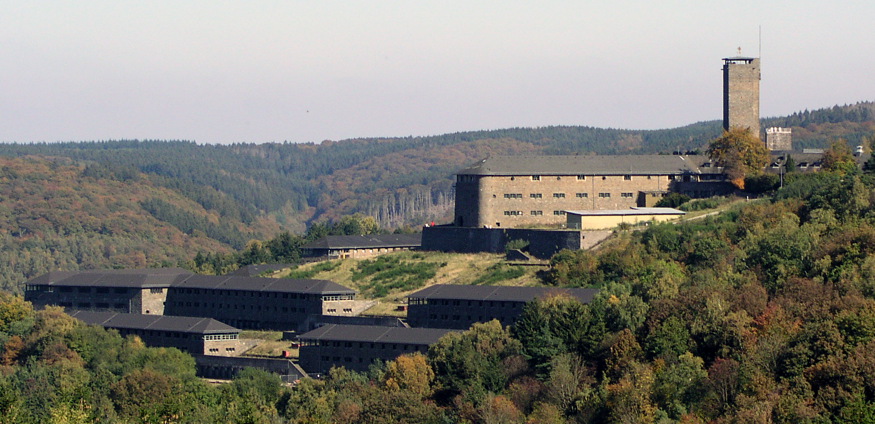 Burg Vogelsang aus der Blickrichtung von Wollseifen